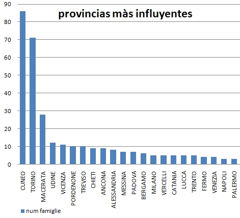 Principales provincias italianas aportantes de inmigrantes ala zonda de Villa del Rosario